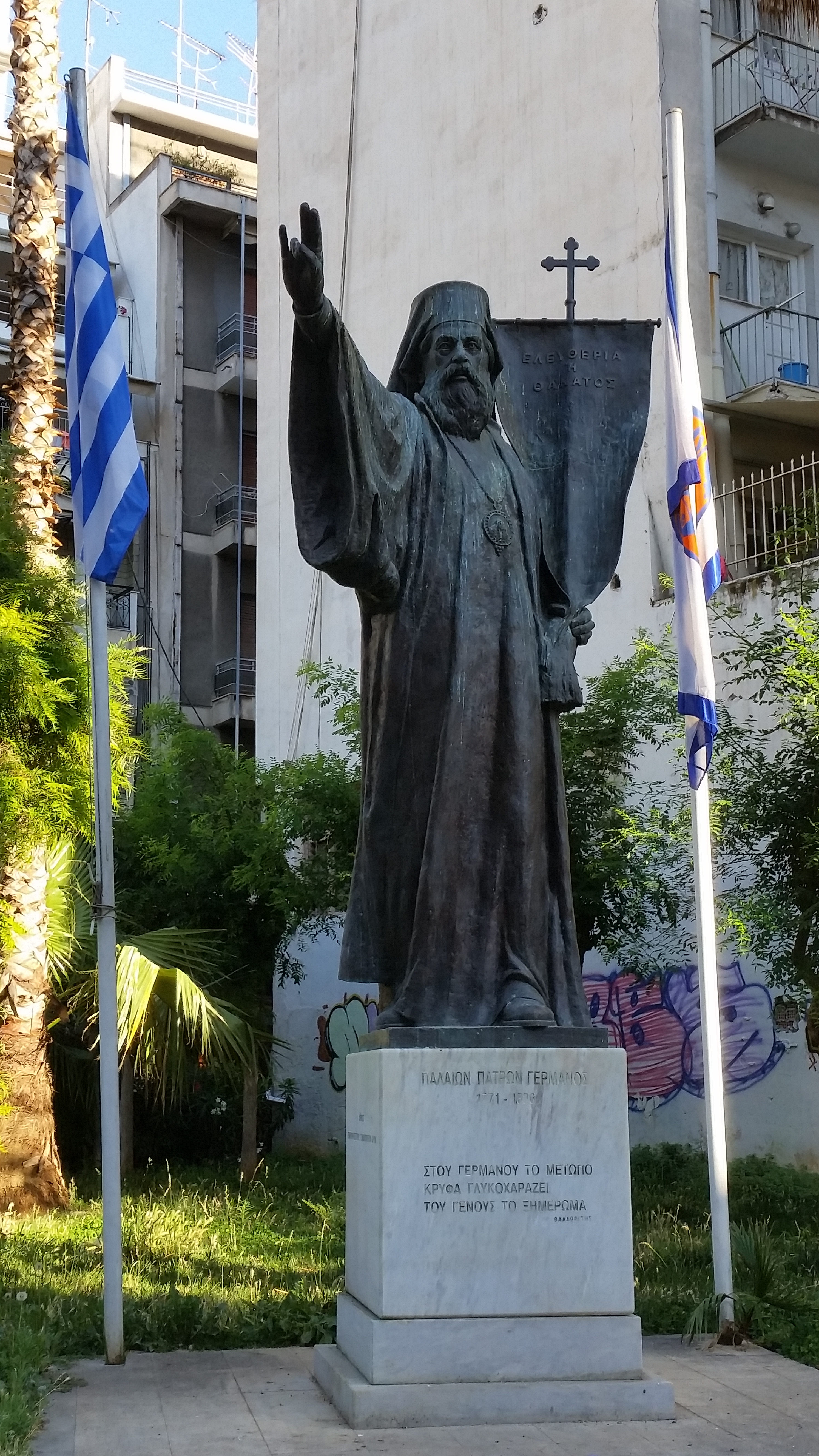 Το άγαλμα του Παλαιών Πατρών Γερμανού στο Πασαλιμάνι του Πειραιά.